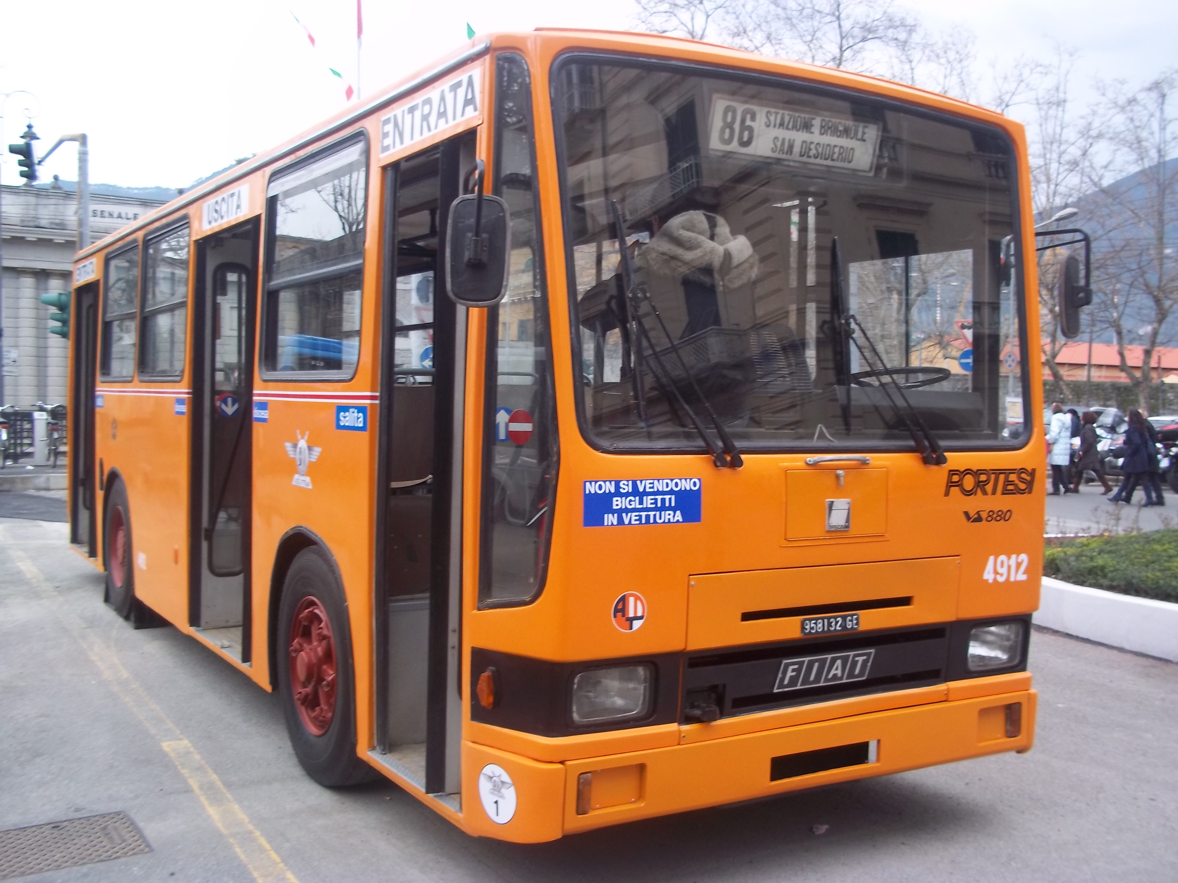 Fiat 418 Portesi VS880 ex AMT Genova n. 4912